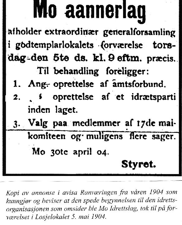 Innkalling til møtet i 1904 hvor Mo idrettslag ble opprettet